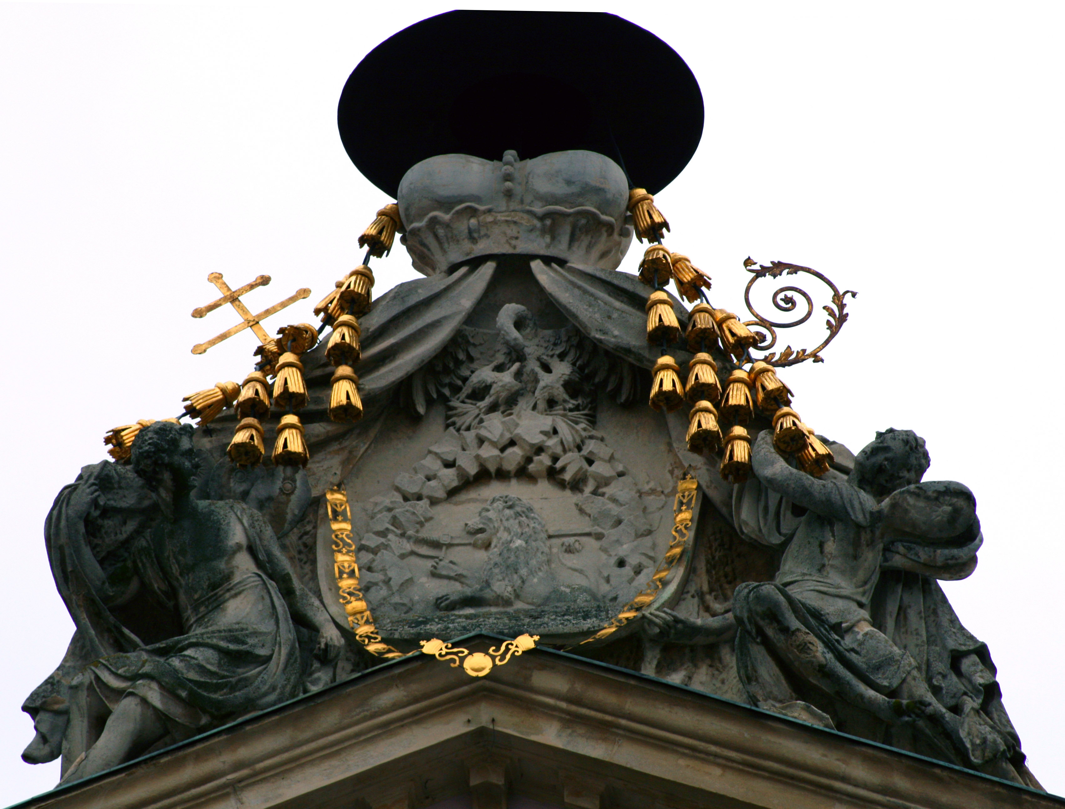 Erb zakladateľa bratislavského primaciálneho paláca kardinála Jozefa Batthyányho. Jeho autorom je Matúš Kögler. Nad kamenným erbom je železný kardinálsky klobúk, ktorý má priemer 180 cm a hmotnosť okolo 150 kg.